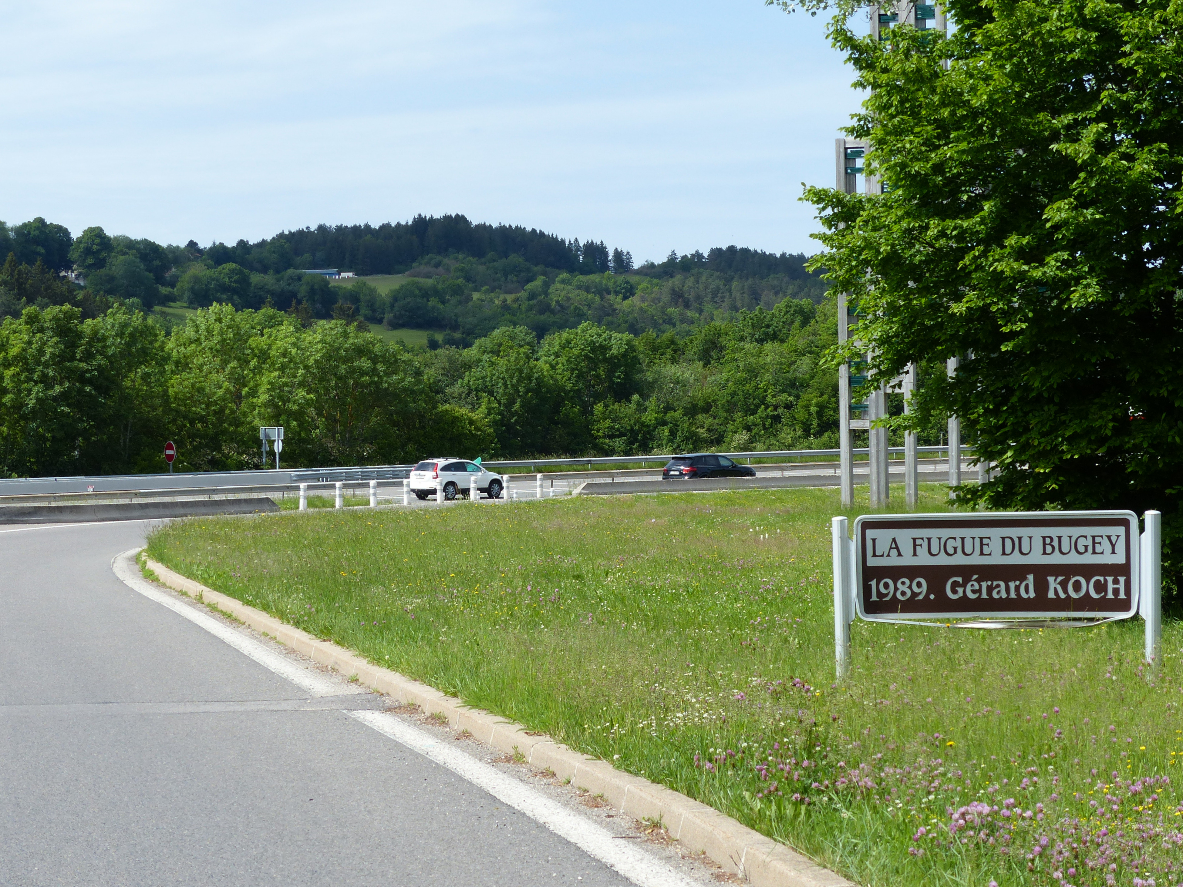 Panneau E37a non conforme de La Fugue du Bugey 1989 Gérard Koch, aire de Ceignes-Cerdon, autoroute A40, Ain, France.